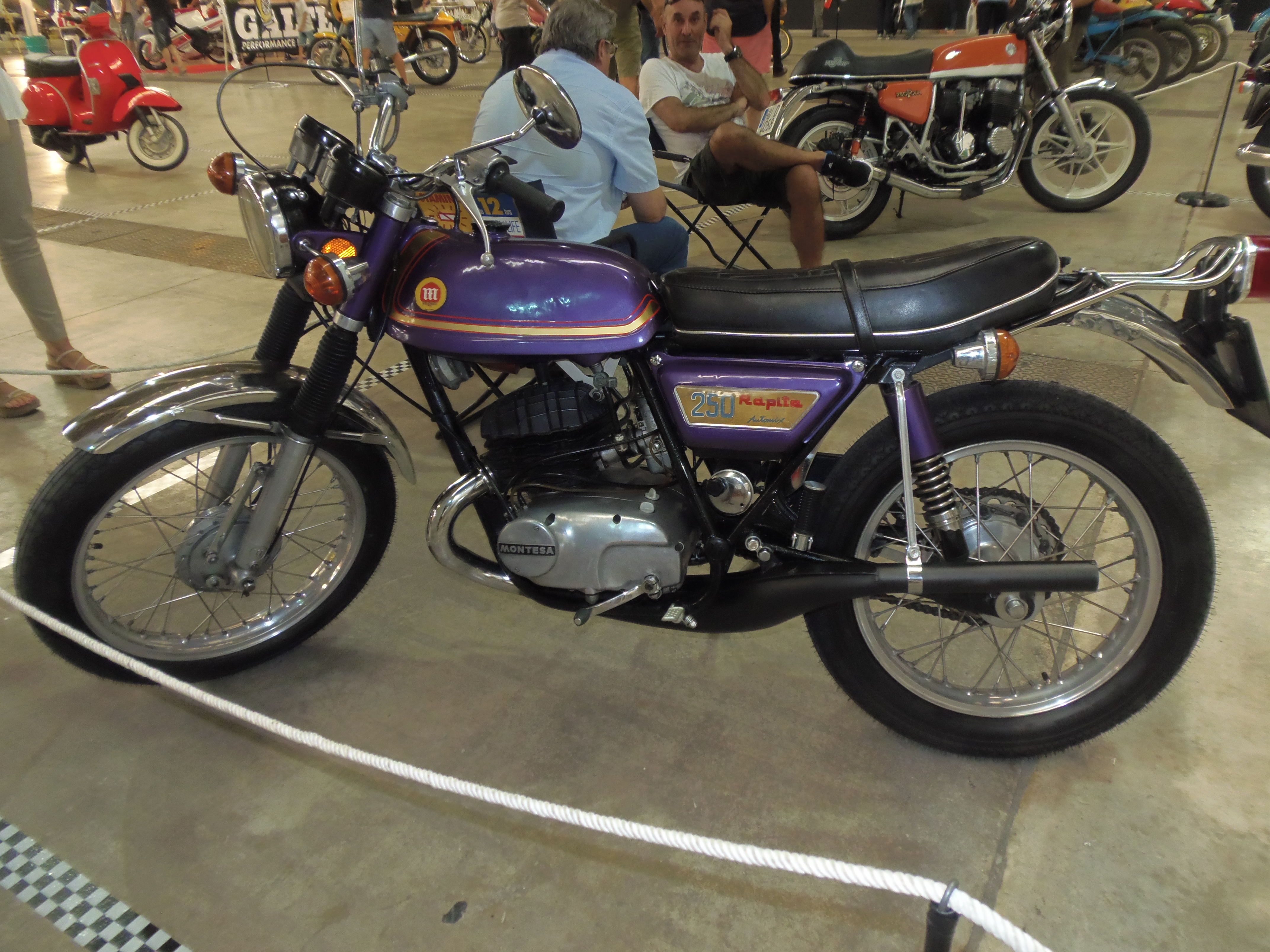 Montesa Rapita 250 "Automix", 1974